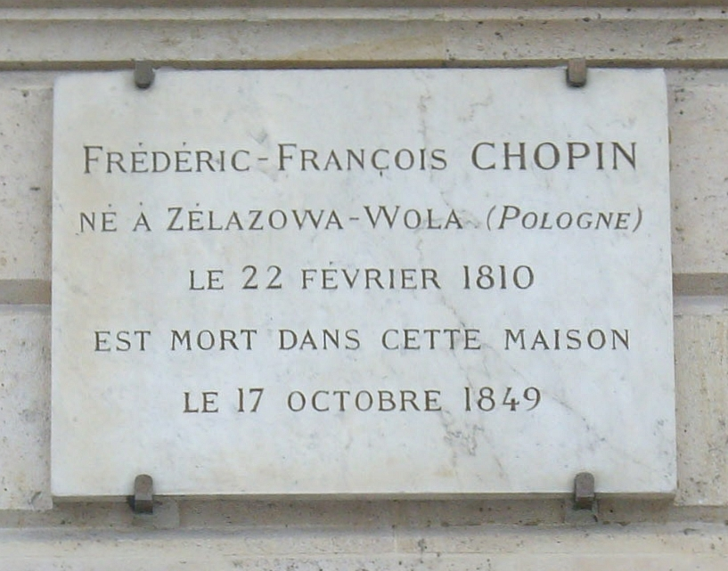 Plaque commémorative sur la façade de l'hôtel Baudard de Saint-James (actuelle joaillerie Chaumet), 12 place Vendôme, Paris 1er.« Frédéric-François Chopin, né à Żelazowa Wola (Pologne) le 22 février 1810, est mort dans cette maison le 17 octobre 1849. »